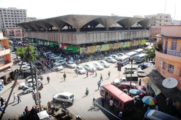 Kiswahili: Kariakoo picha juu ya ghorofa. Mwonekano wake kwa mbali.